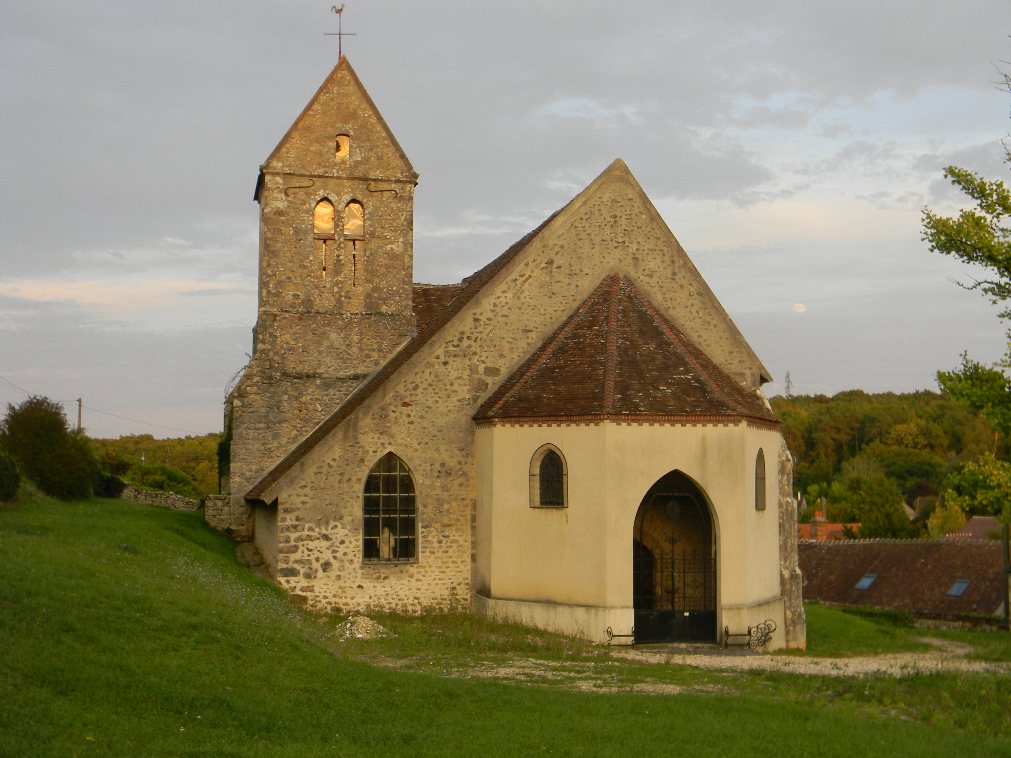 Eglise Saint-Sulpice de Faÿ-lès-Nemours (77167)